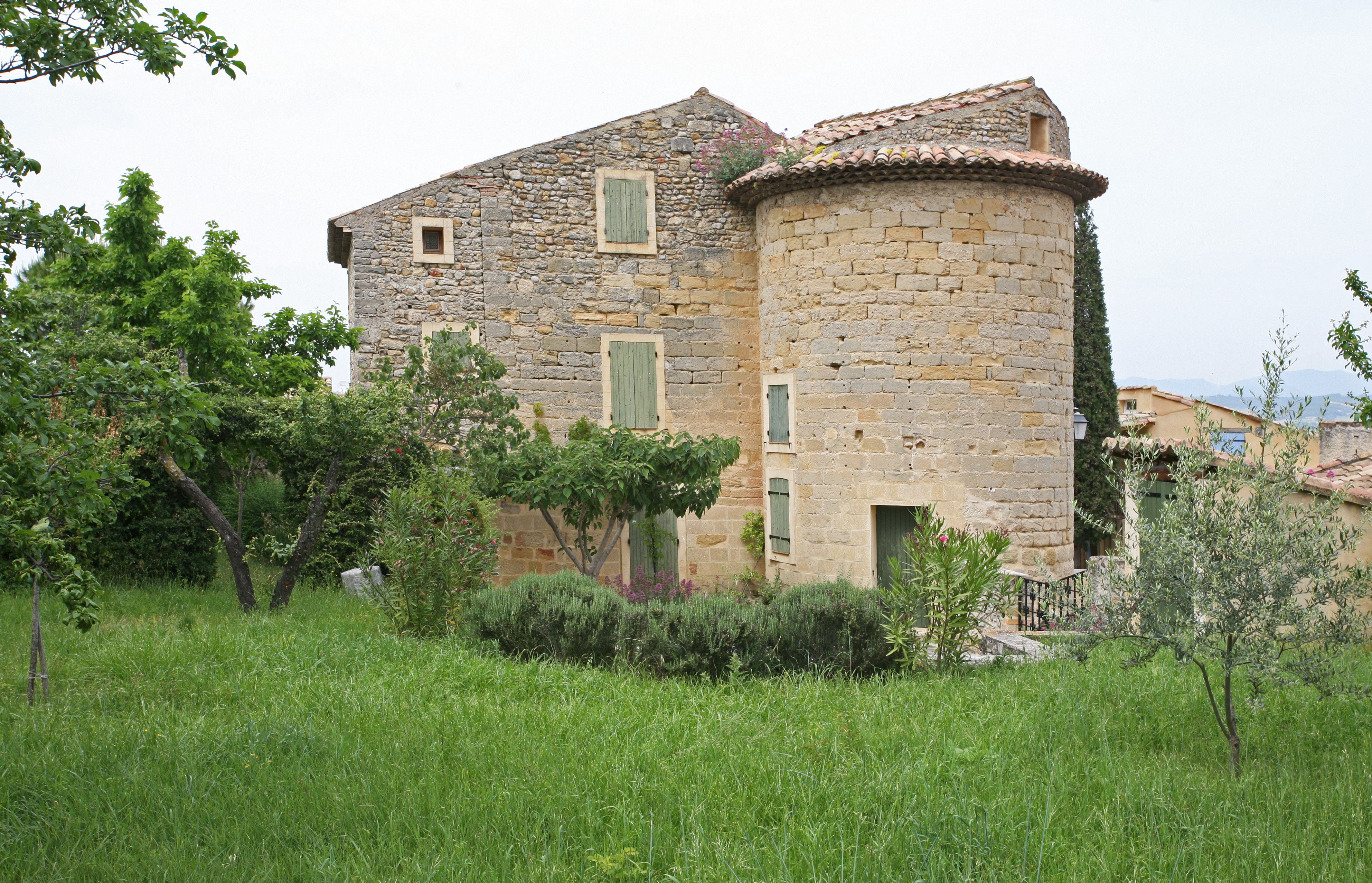 Construction sur les hauteurs de Saint-Roman-de-Malegarde (commune de Vaucluse)